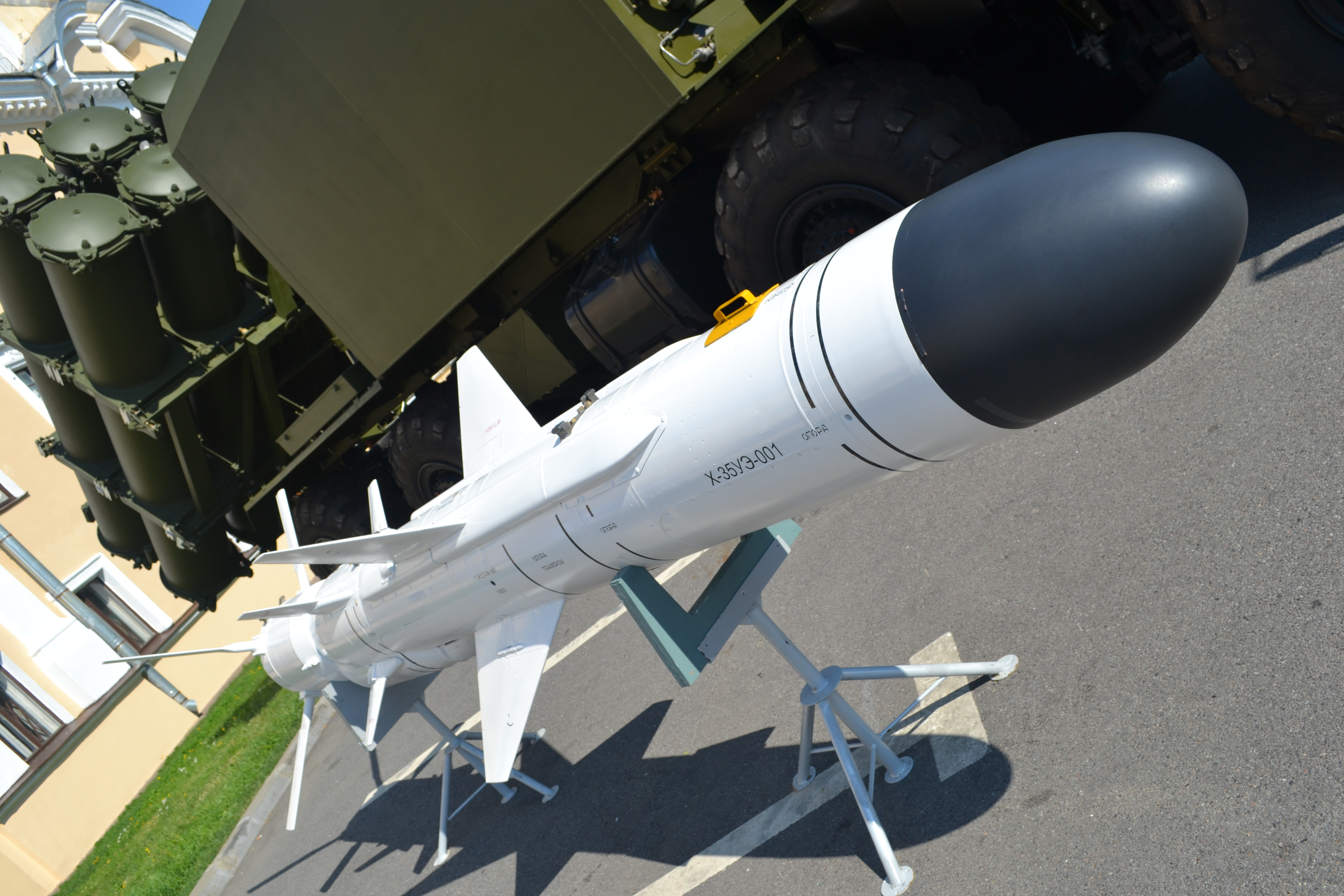 Противокорабельная ракета Х-35